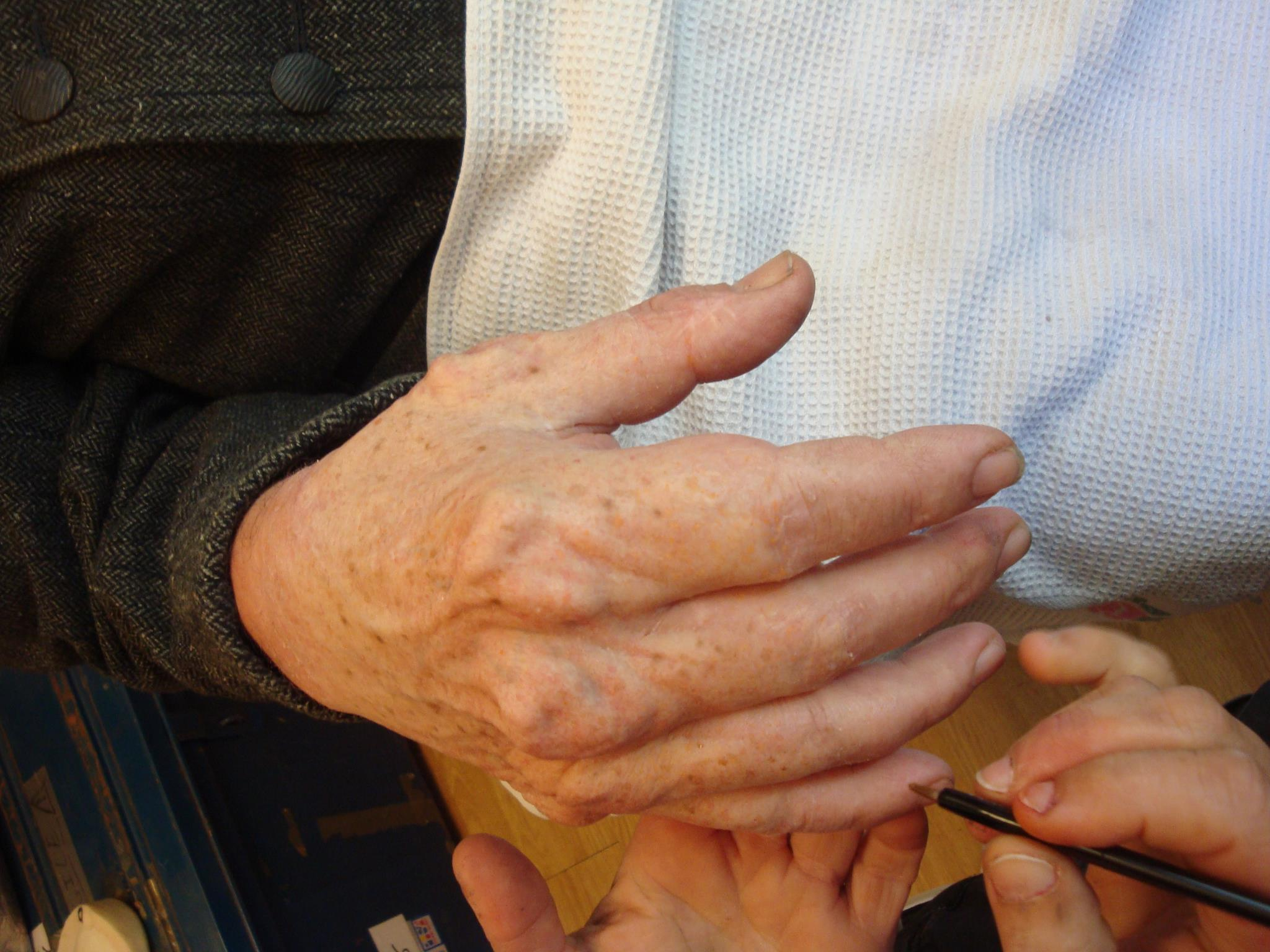 film dans lesquel je double la main de l'artiste